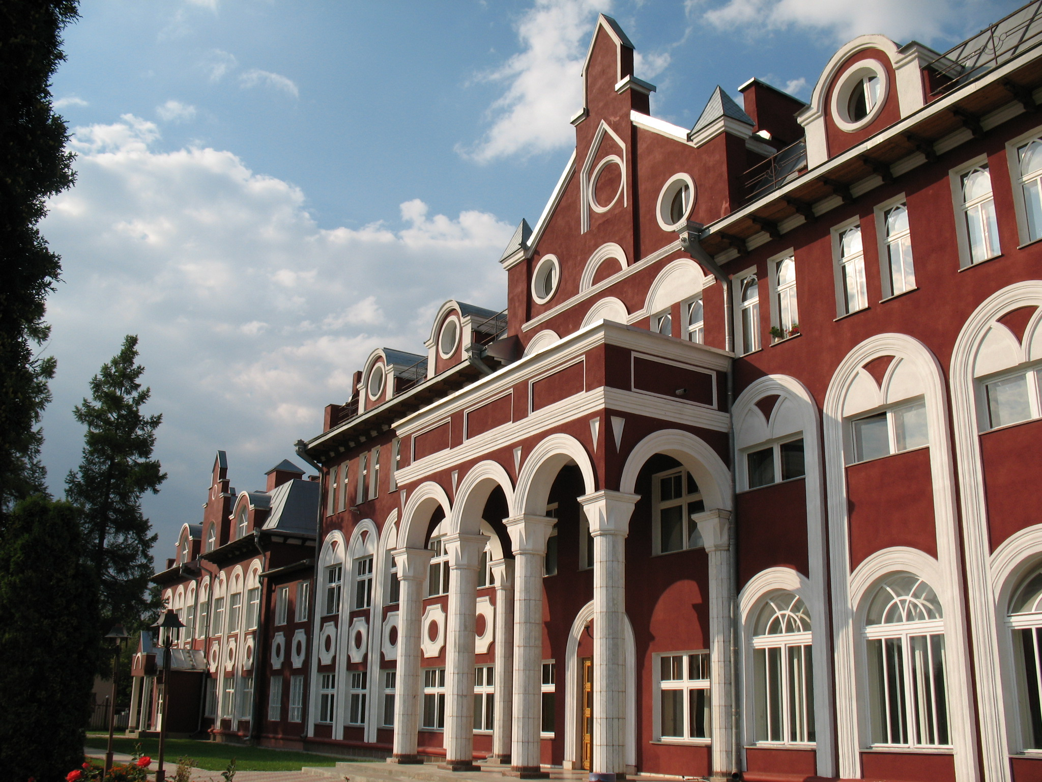 Институт перевода Библии располагается в здании ЗХГЭИ